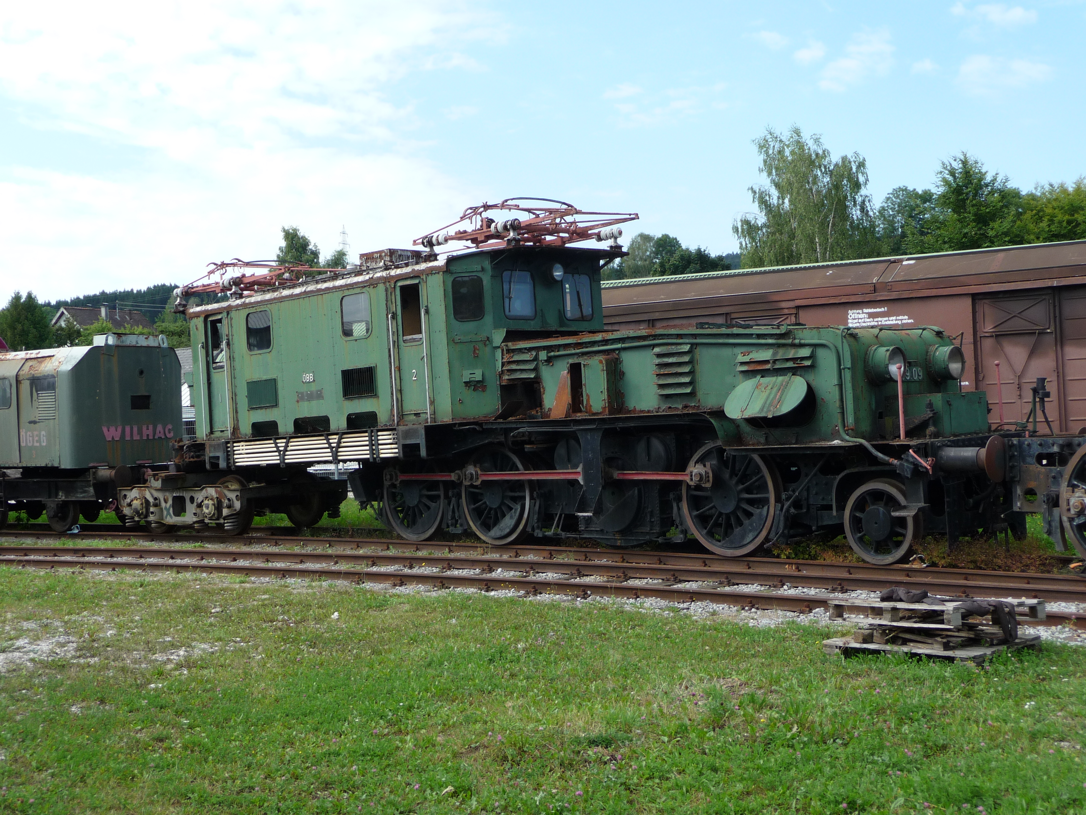 eine teilweise zerlegte 1189.09 der ÖBB im Eisenbahnmuseum Ampflwang